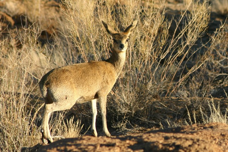 Oreotragus oreotragus